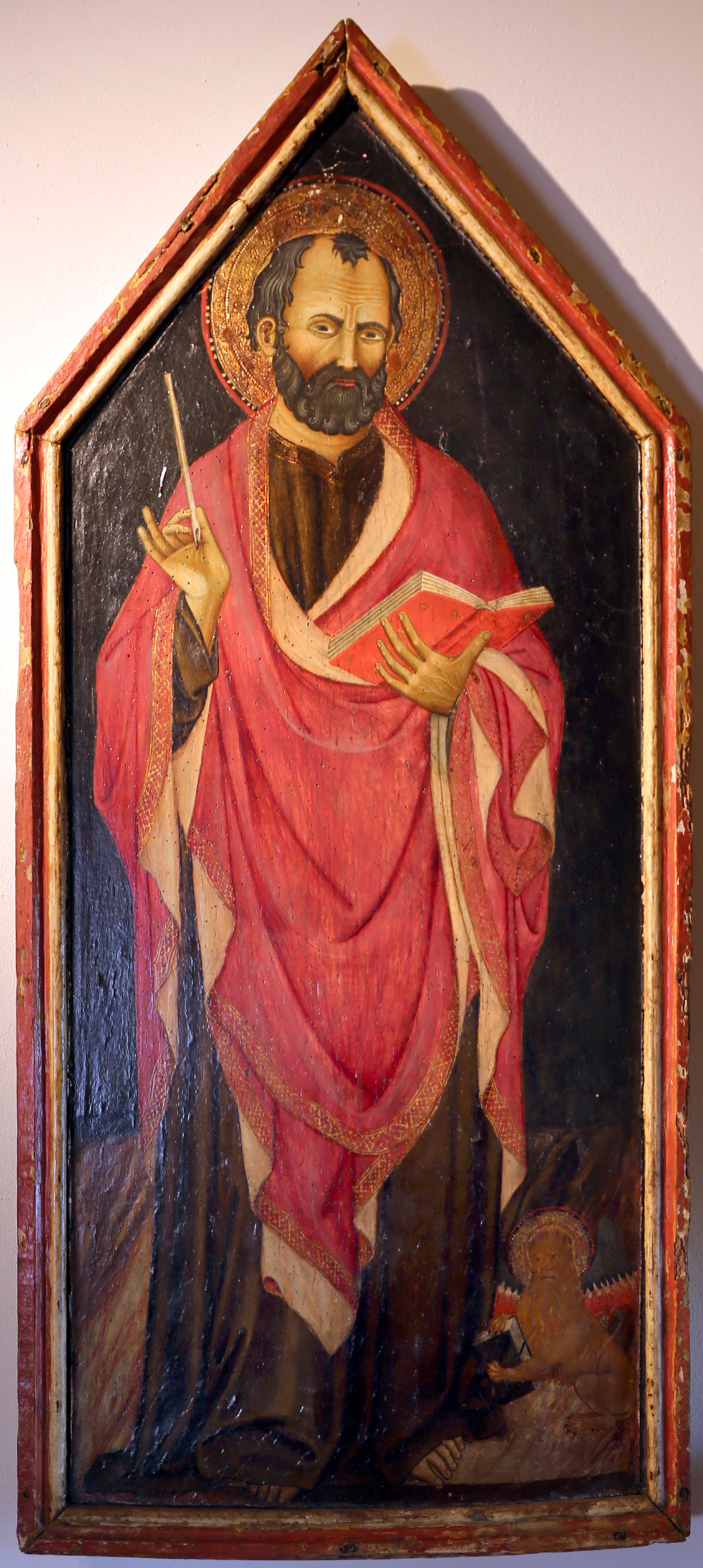 Museo del Colle del Duomo (Viterbo) This is a photo of a monument which is part of cultural heritage of Italy.